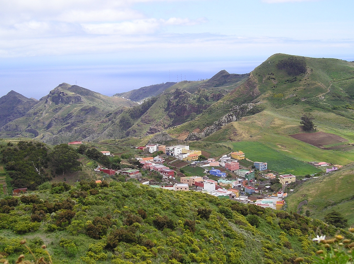 selbst erstellt am 20.4.05, ein Dorf im Anagagebirge im Nordosten Teneriffas LIZENZ